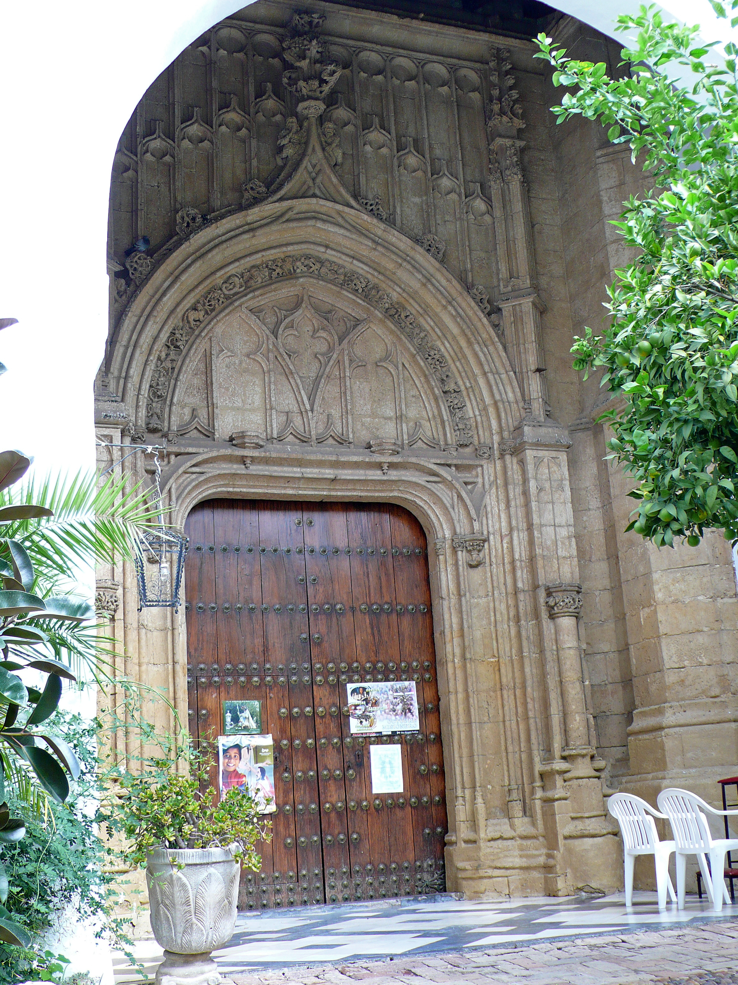 Magnífica portada del Convento de Santa Marta de Córdoba (España) realizada por el maestro arquitecto HERNAN RUIZ I (el Viejo) en 1505, para el monasterio de las monjas jerónimas de SANTA MARTA (1487). Es ejemplar del arte gótico ojival florido o gótico humanista, arte, impulsado por los Reyes Católicos. El conjunto arquitectónico de la entrada al convento, su patio, es otra belleza de la inalcanzable Córdoba.